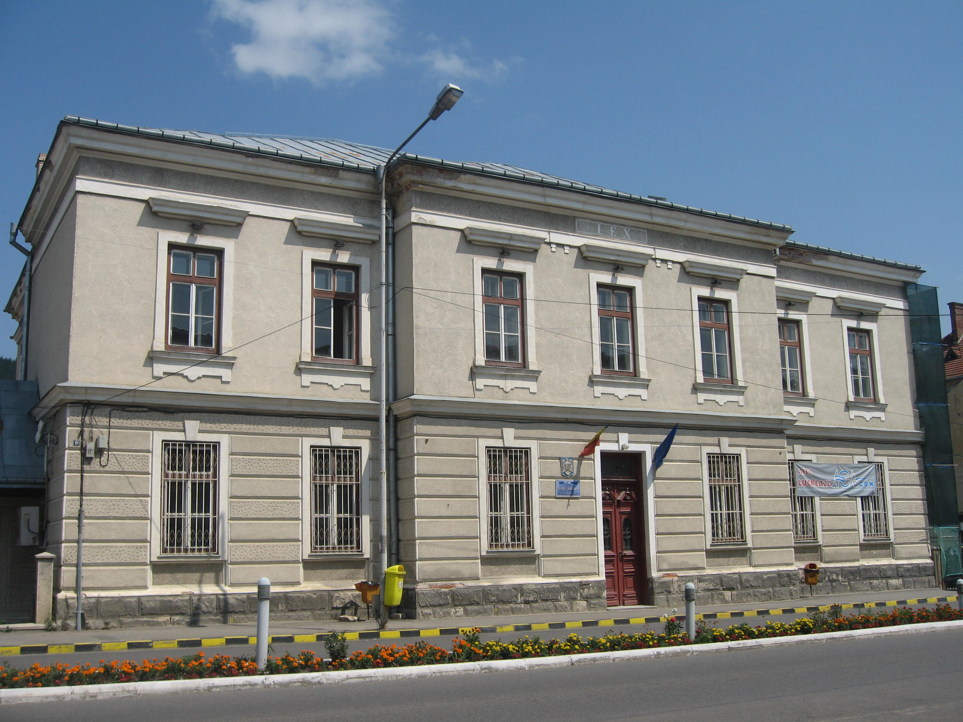 Judecătoria Gura Humorului